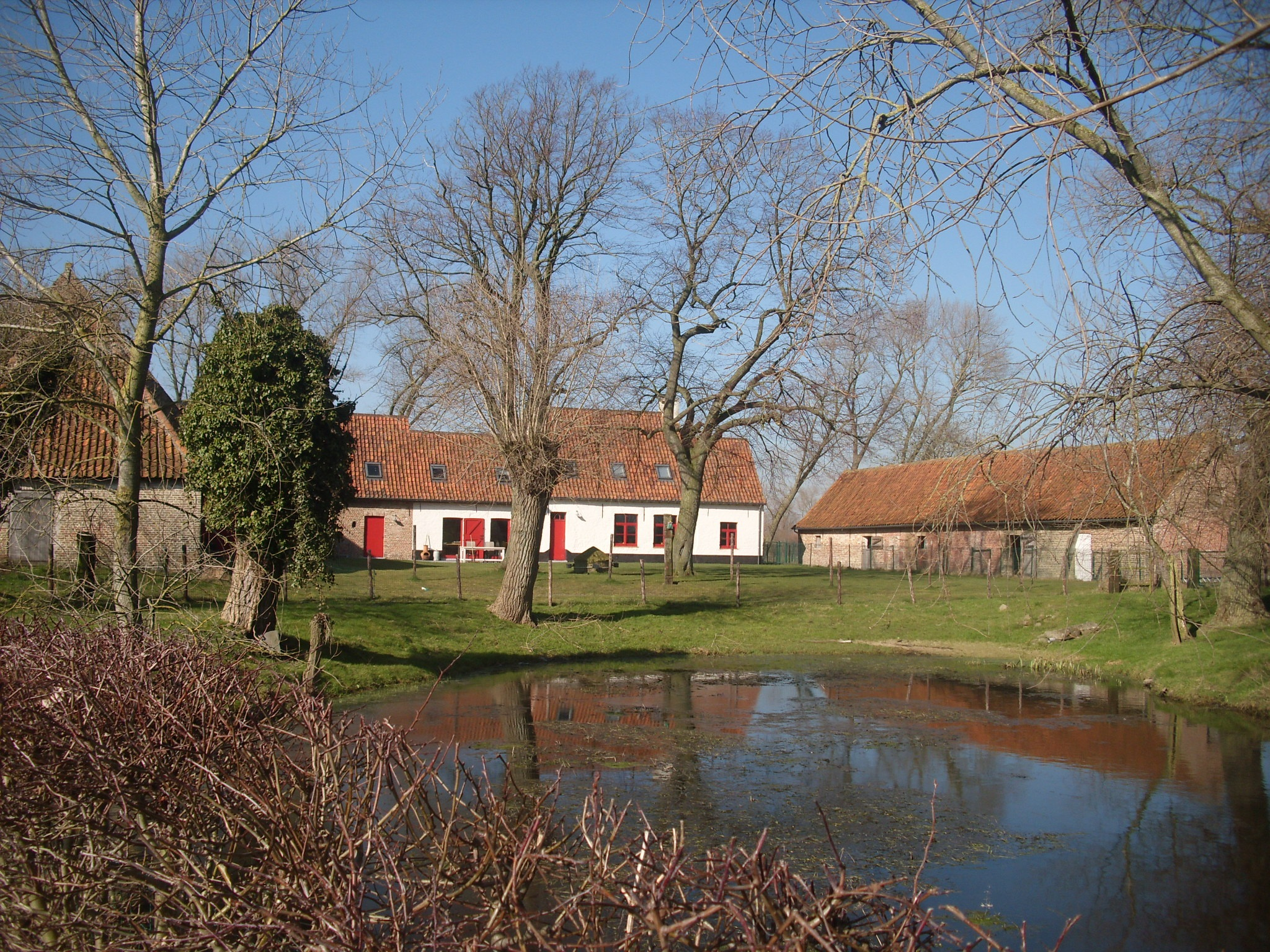 't Croonken - Westernieuwweg 80 - Varsenare - Jabbeke - West-Vlaanderen - België